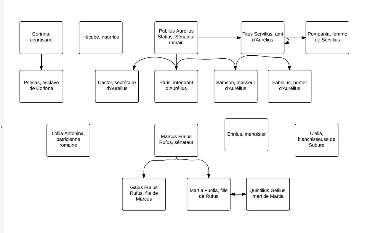 Organigramme du livre Mors Tua de l'auteur Danila Comastri Montanari